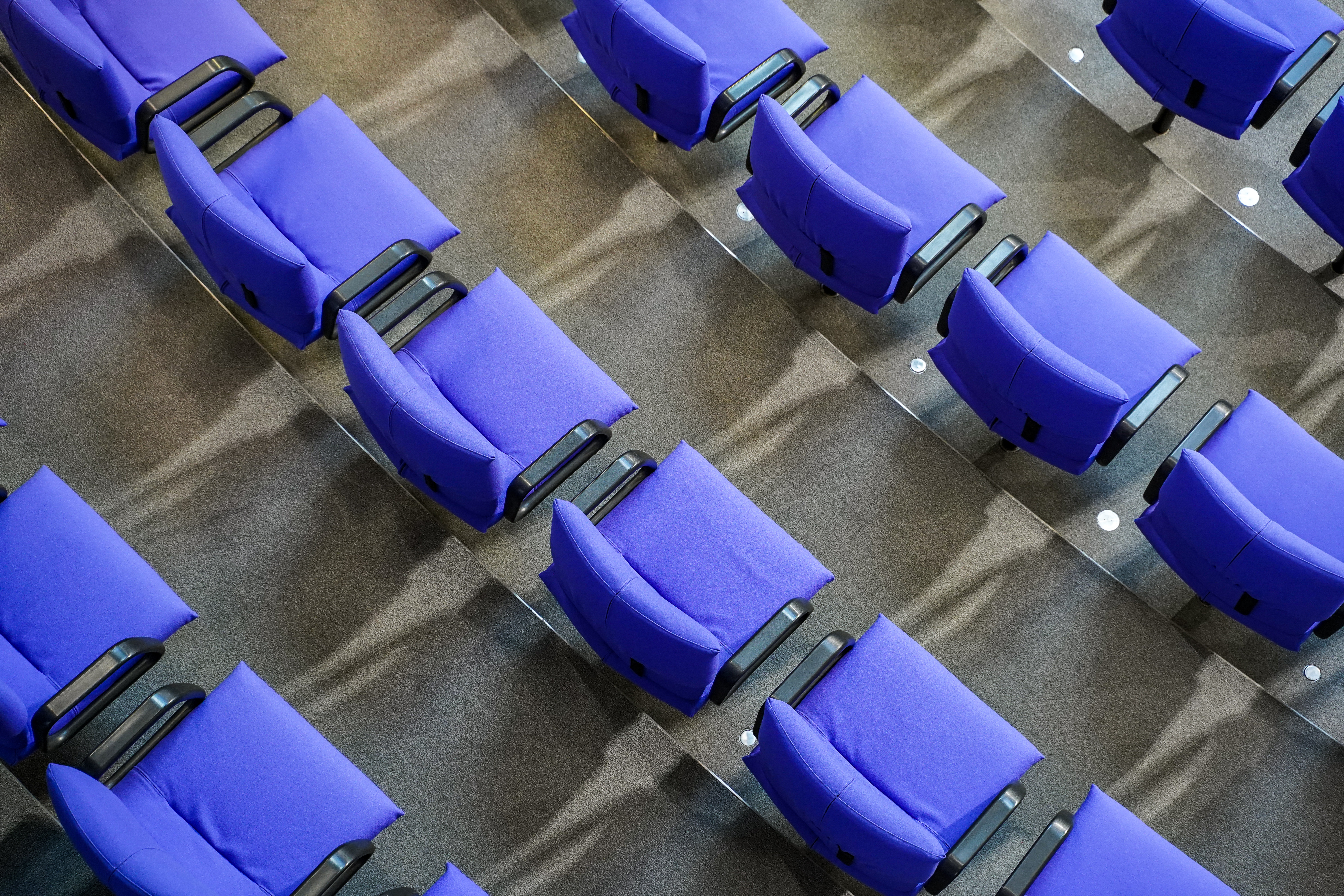 Plenarsaal-Sitze (Farbe: Reichstags-blue).